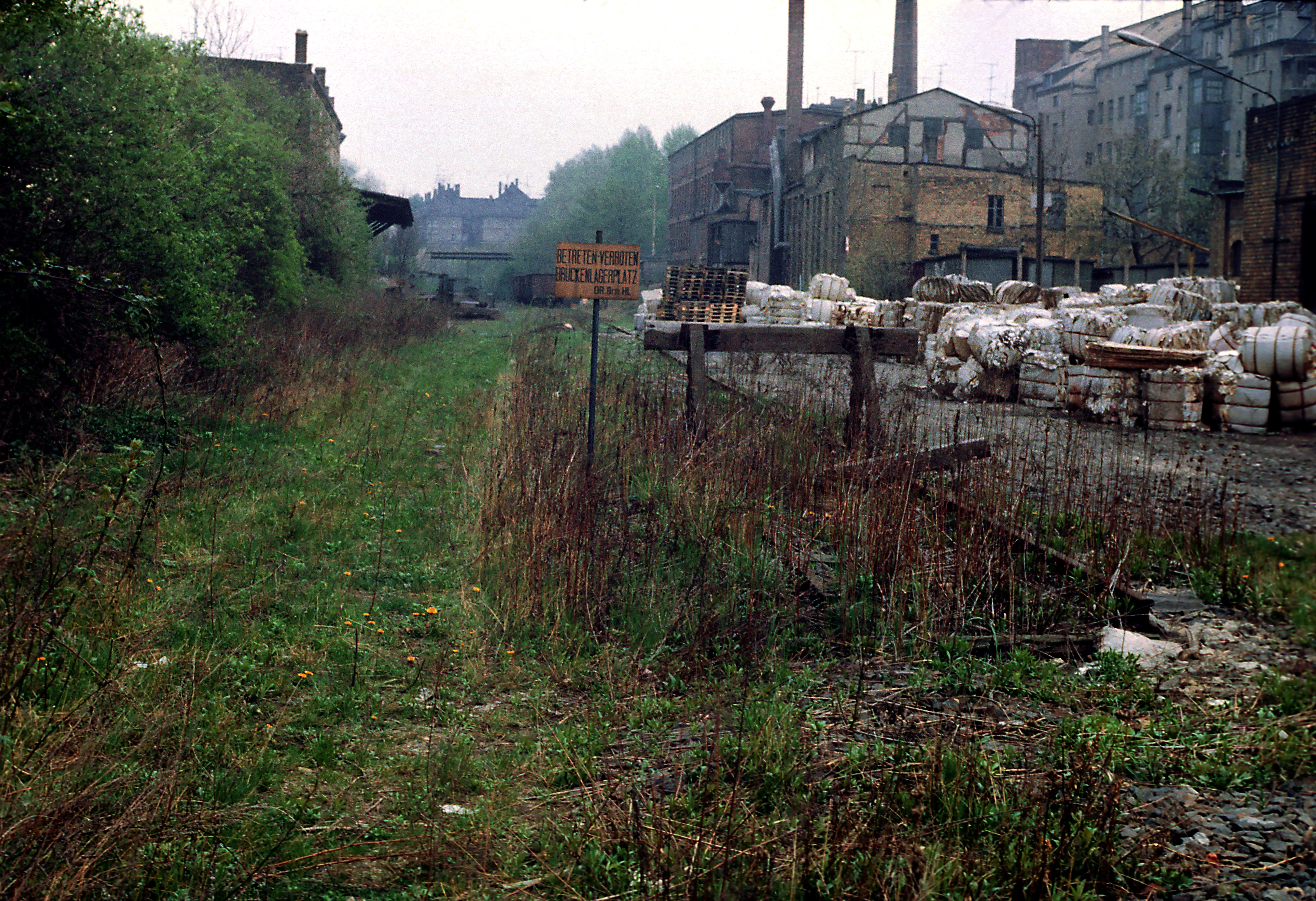 zwischen Riebeck- und Martinstraße Richtung Osten, am Gleisstutzen lag ein Lagerplatz der Brückenmeisterei Halle (S). Zusätzlich diente er als Ausziehgleis für den Anschluss Buchbindereimaschinenwerk Leipzig (vorm. Maschinenfabrik Karl Krause).